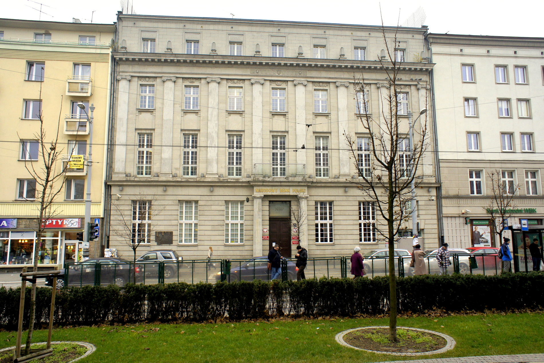 Budynek banku przy Alejach Marcinkowskiego 12, adres Krzysztofa Komedy po powrocie do Poznania w 1952 r. ( widok współczesny )